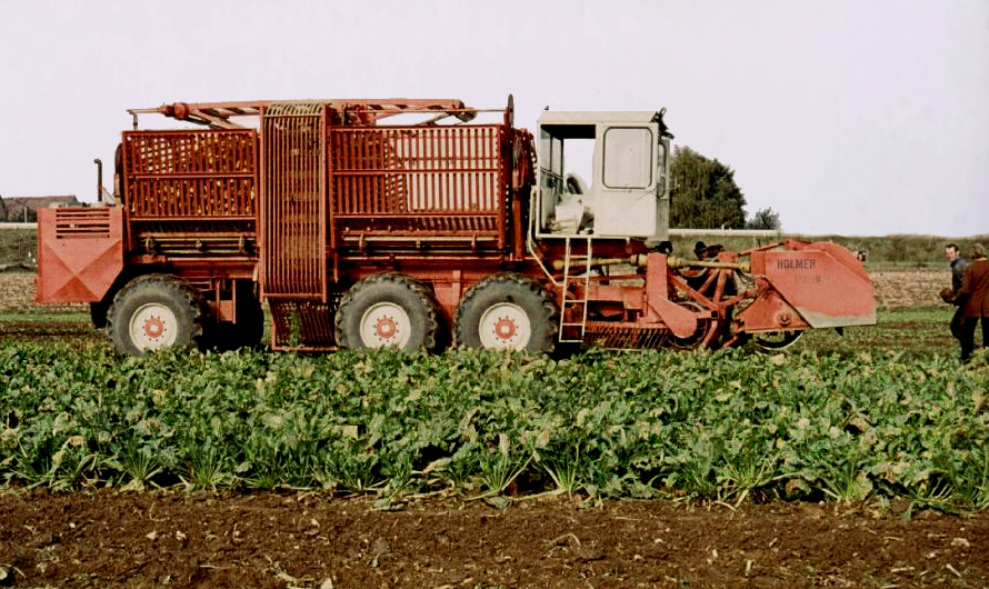 Rübenroder von Holmer, Baujahr 1975